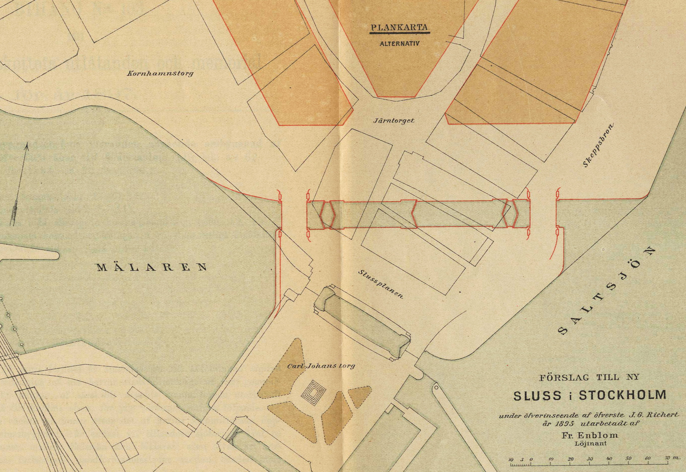 Förslag till ny, nordlig placerad sluss i Stockholm med överfartsvägar till Södermalm. Slussen skulle gå diagonalt över kvarteren Narcissus, Cadmus, Achilles och Mesusa.